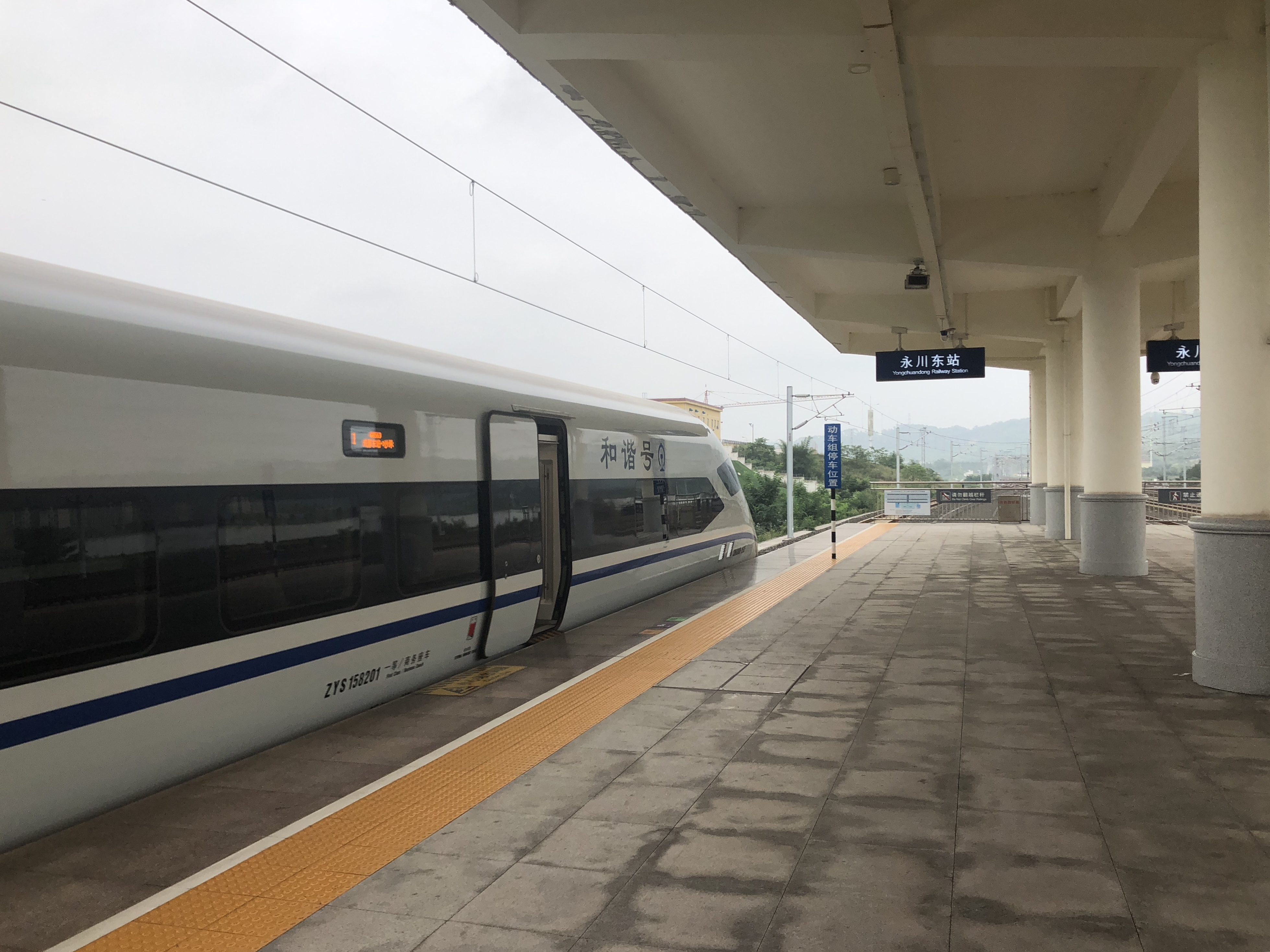 中文（中国大陆）: CRH380D-1582 担当 G8563 停靠永川东站